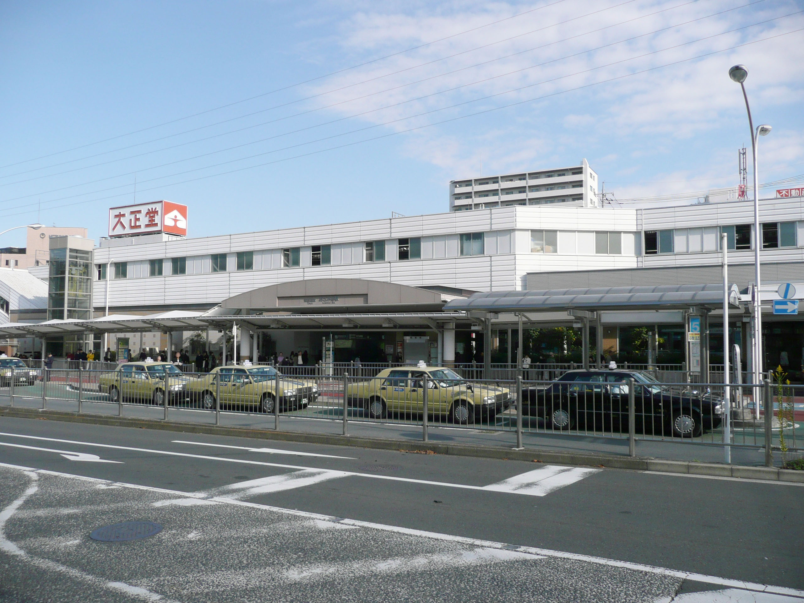 東急あざみ野駅西口